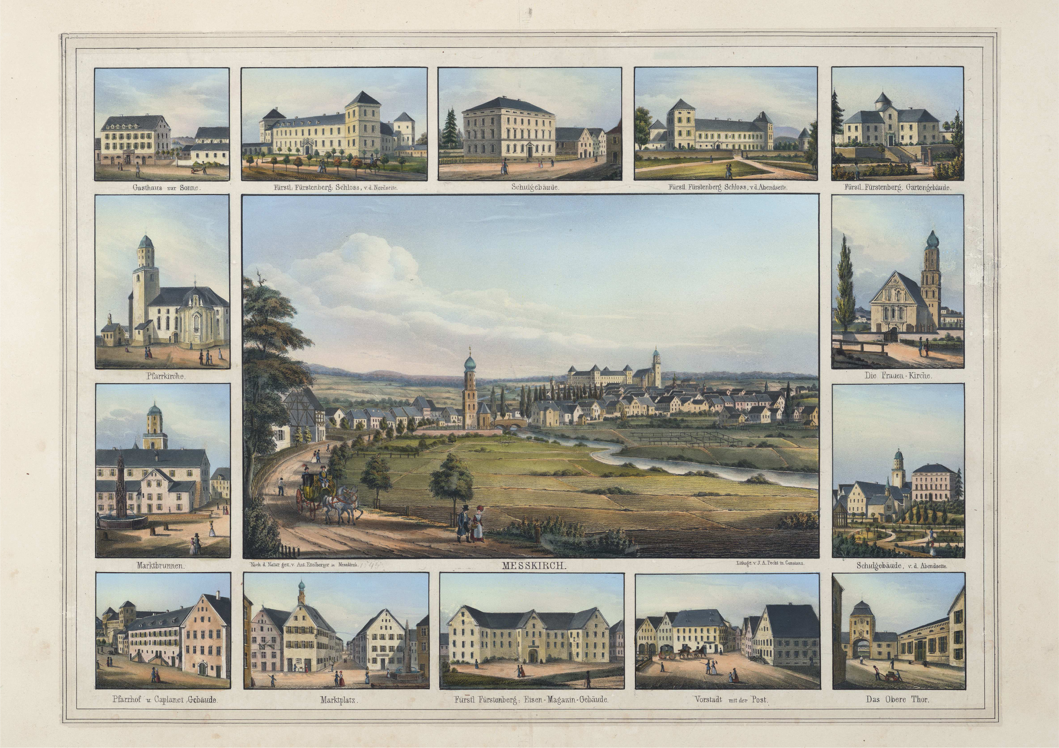 Souvenirblatt der Stadt Meßkirch Gesamtansicht in der Mitte: Meßkirch von Südosten, von der Straße nach Göggingen aus gesehen. links oben: Gasthaus zur Sonne. oben in der Mitte: das neu errichtete Schulgebäude. links und recht davon: zwei Ansichten des Schlosses der Fürsten von Fürstenberg rechte Spalte, drittes Bild von oben: weitere Ansicht des Schulgebäudes. untere Leiste, zweites Bild:Rathaus vor dem Abriss 1898 untere Leiste, außen rechts: Oberes Tor